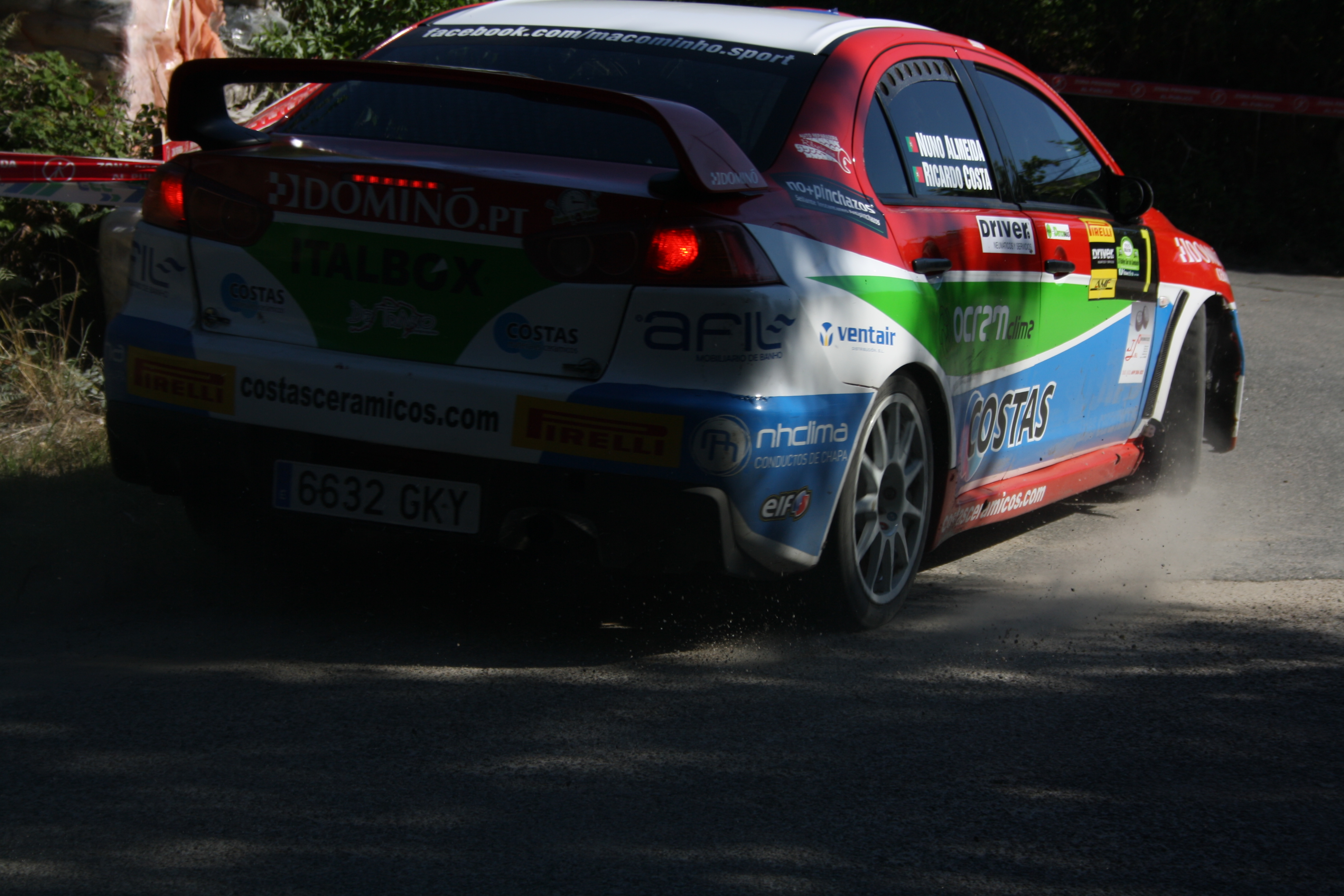 TC6, Salvaterra de Miño